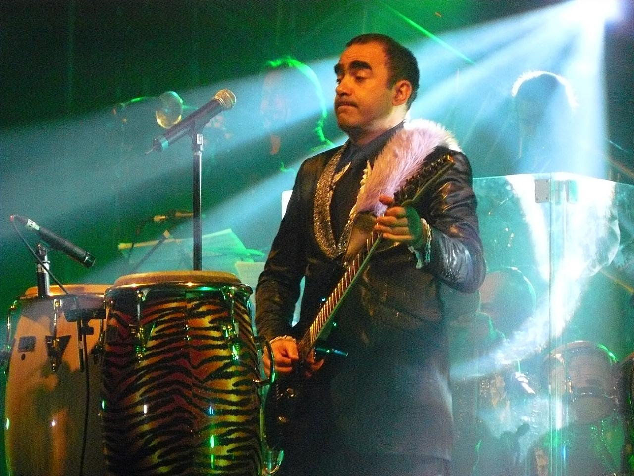 Lumbaart: L'Elio duranta el sòna la ghitara in Tapparella.